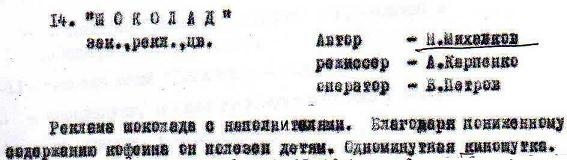 Аннотация к рекламному кинофильму "Шоколад", 1972 год.